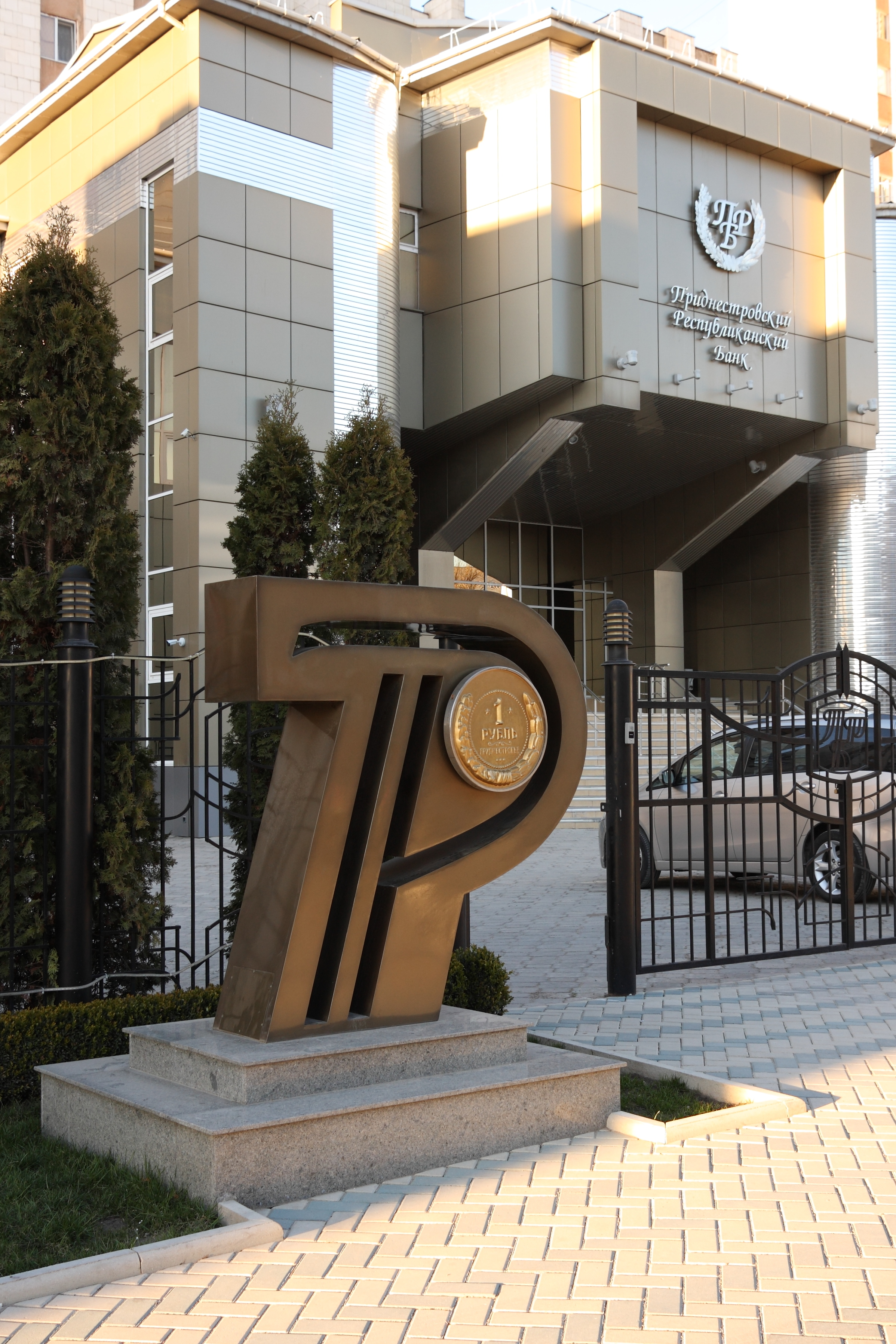 at front of Transnistrian Republican Bank Памятник приднестровскому рублю на фоне Приднестровского республиканского банка IMG_8939